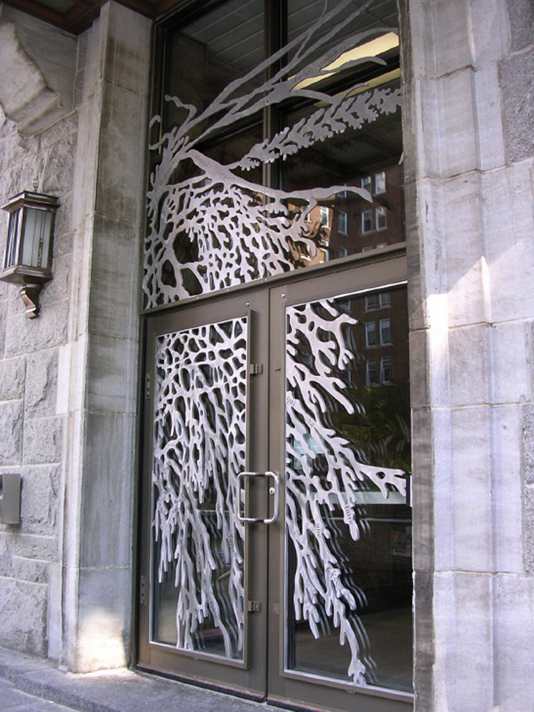 Détail de l'œuvre « De Marc-Aurèle Fortin à Vaillancourt en passant par Miron » installée sur les portes du Ministère de la Culture, des Communications et de la Condition féminine à Québec.